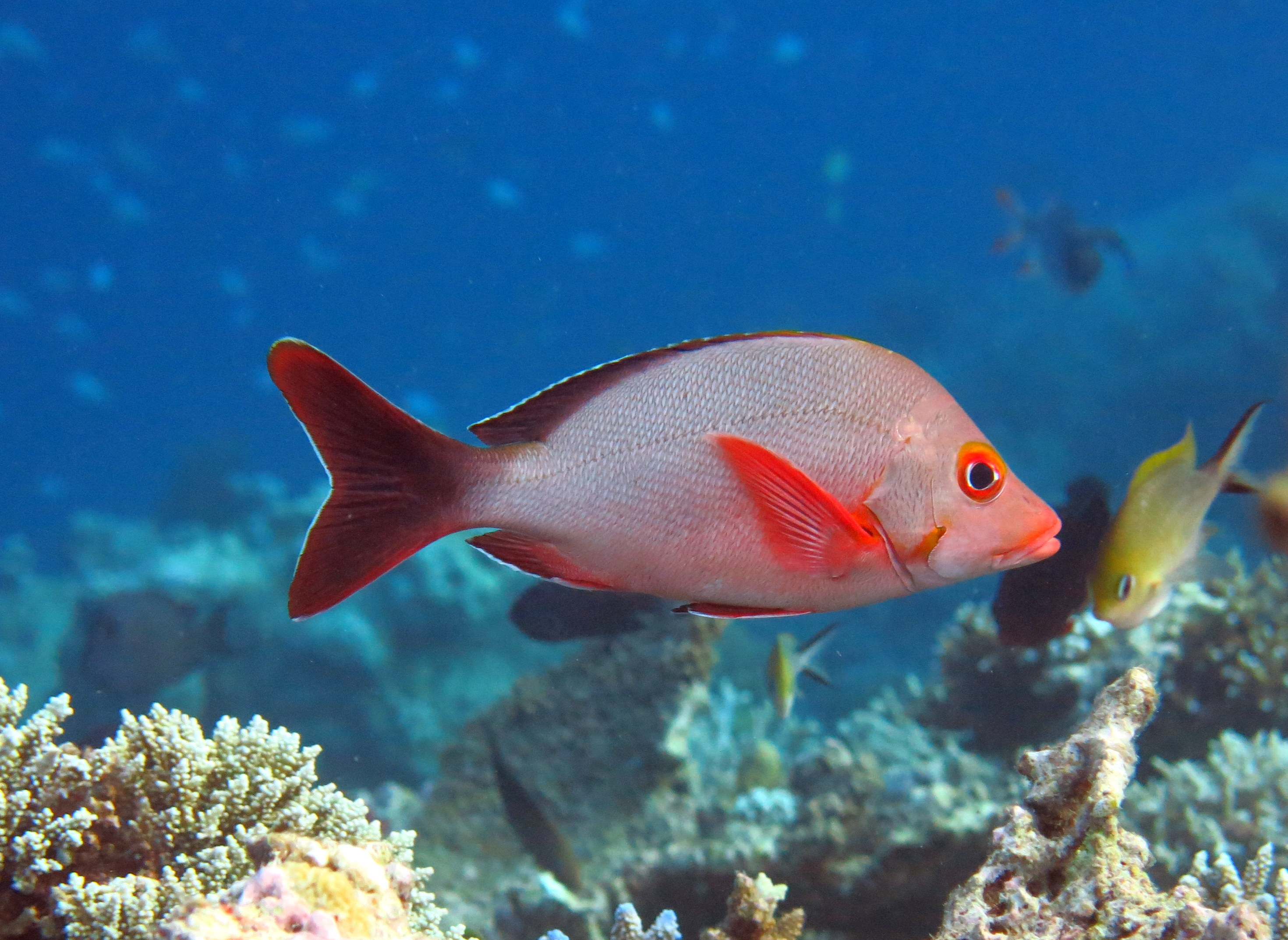 Un vivaneau bossu (Lutjanus gibbus) aux Maldives (atoll de Baa).